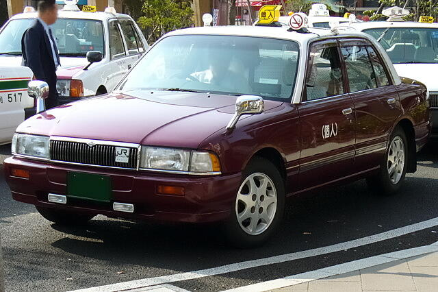 日産・クルー（個人タクシー）